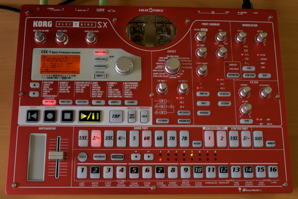 Korg Electribe SX (ESX-1) La teuf à la maison!